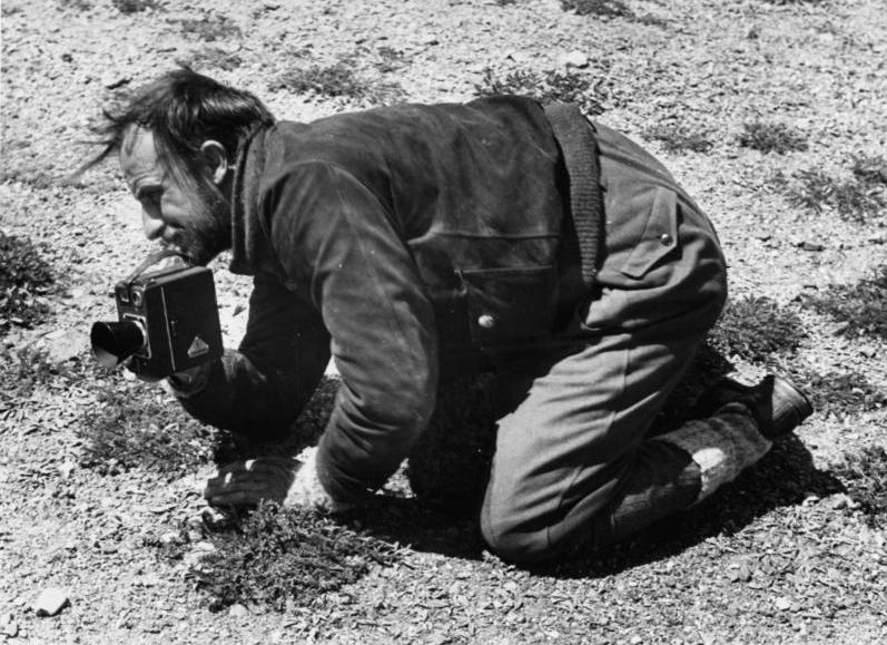 Gayamtsona [Gyamtsona] -See, Krause filmt, sehr deutlich die blauen Wicken